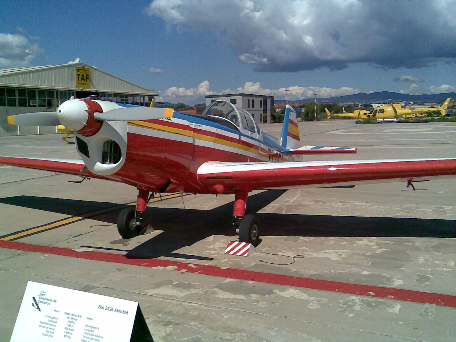 Avión propiedad de la FPAC